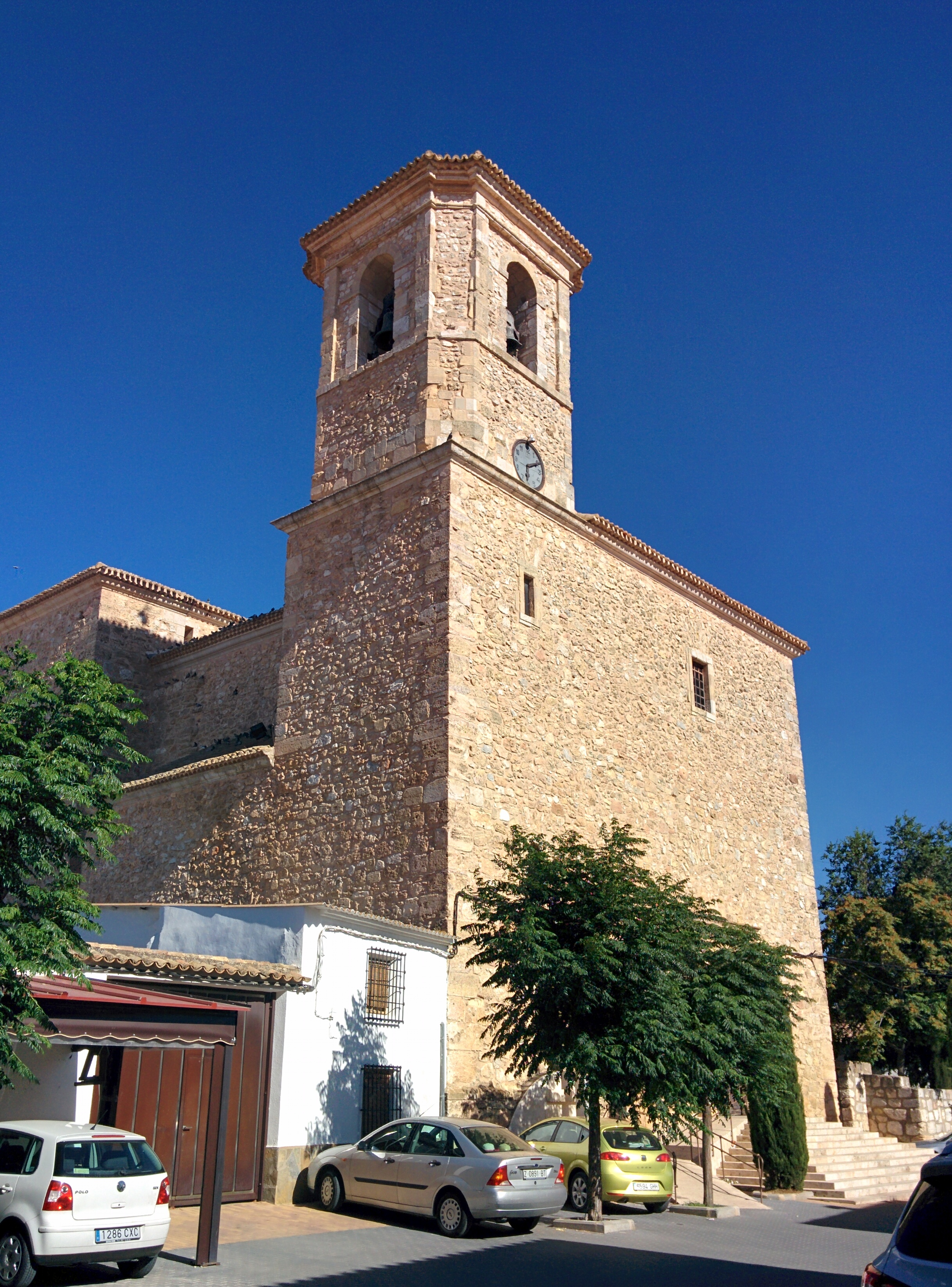 Iglesia de Nuestra Señora de la Asunción, en El Pedernoso (Cuenca, España).